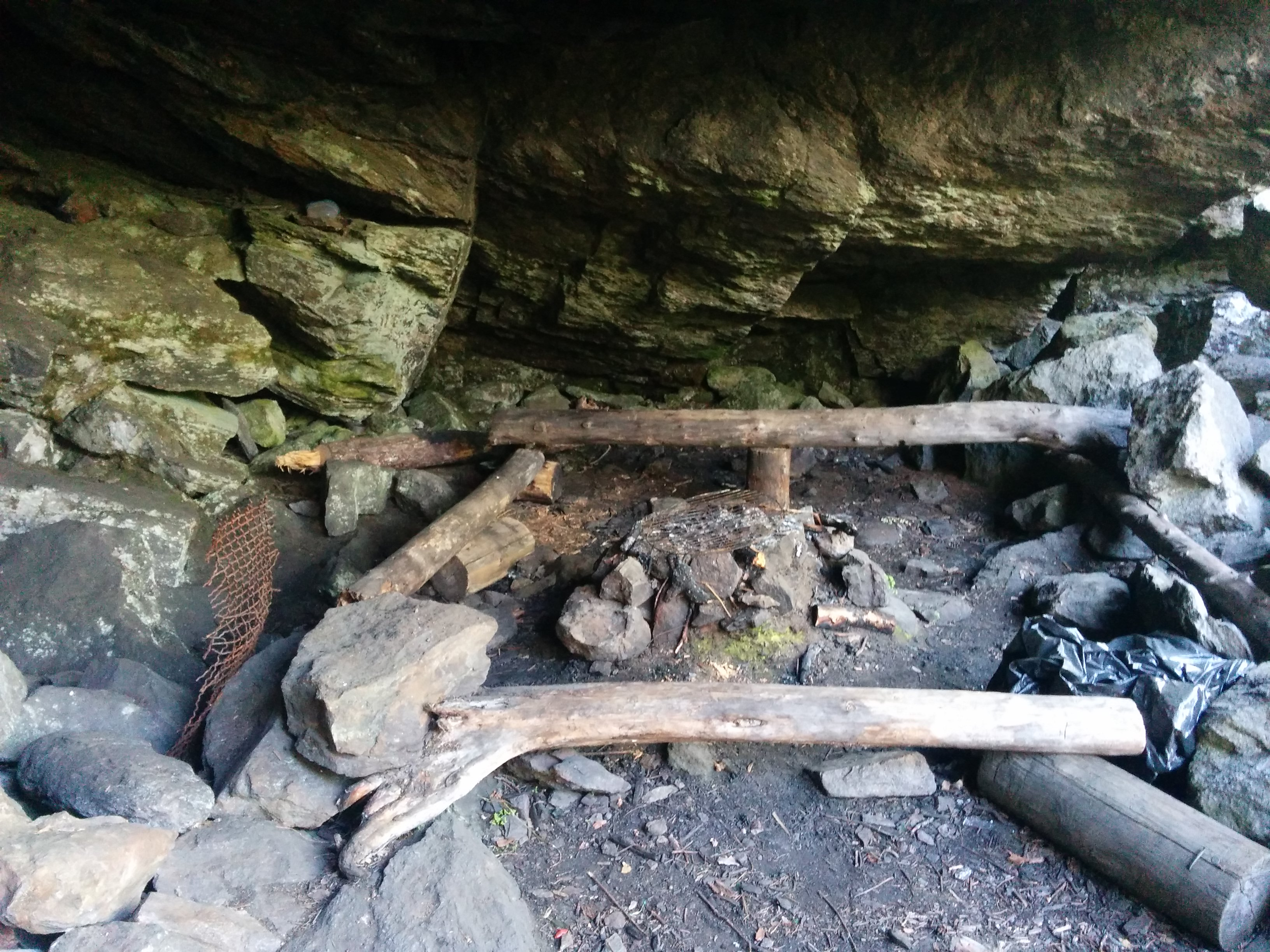 Vilomöjlighet i Jättstugan.